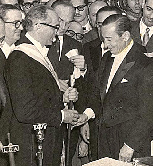 Es una foto del día que Frondizi recivio la banda presidencial y el bastón.